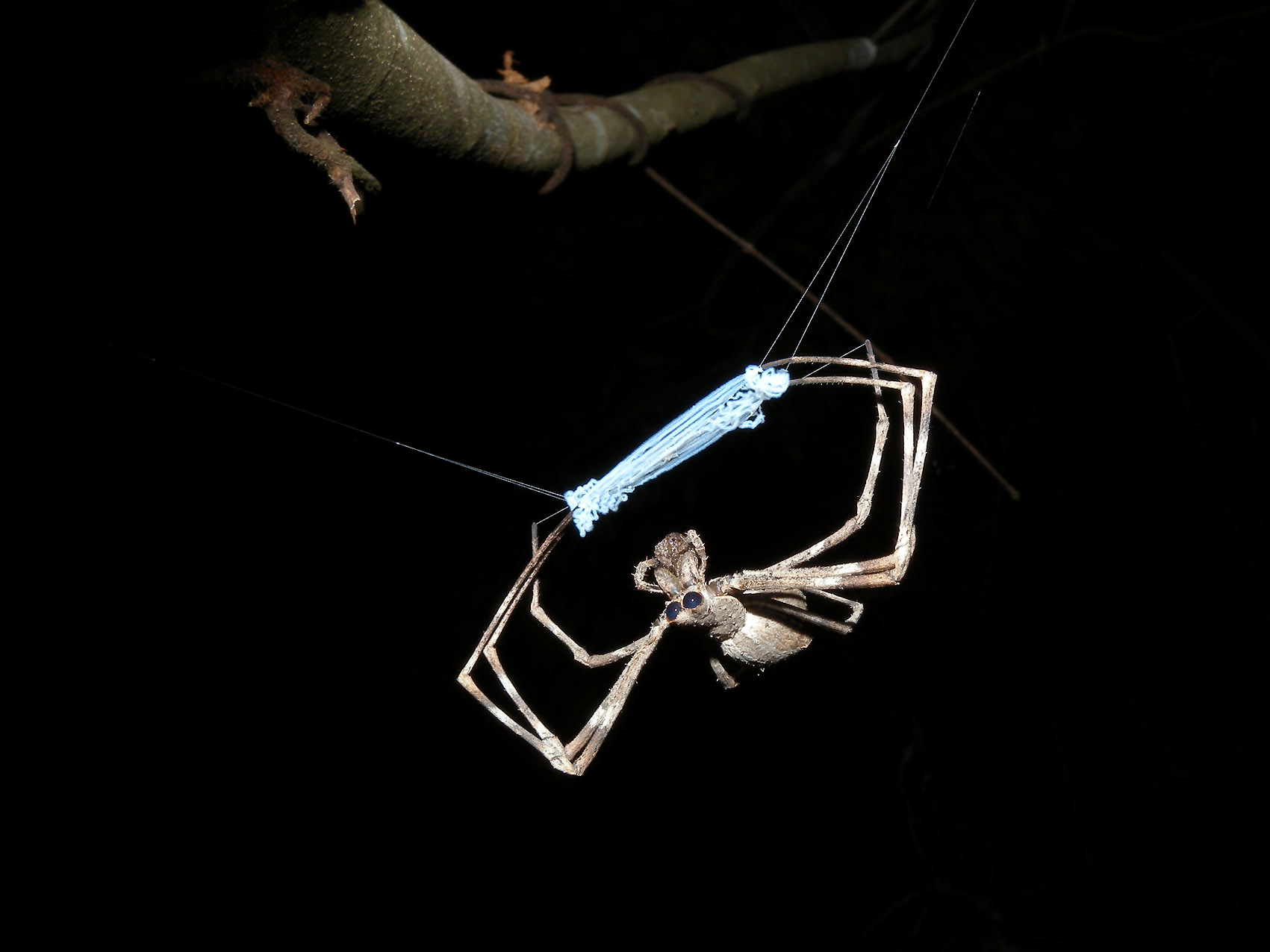 Deinopis madagascariensis in Nationaal park Ankarafantsika, Madagaskar